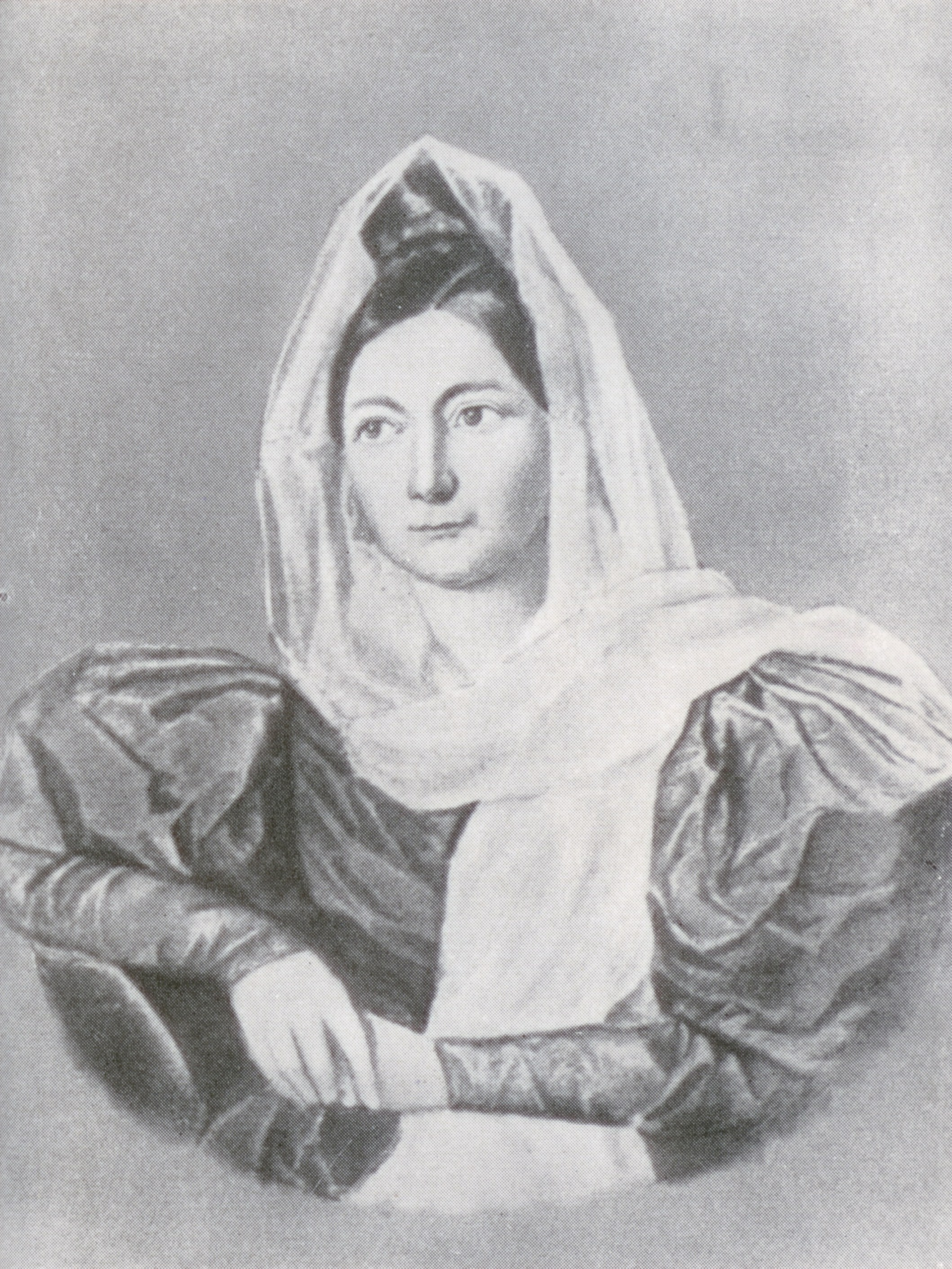 Екатерина Сергеевна Уварова, урожденная Лунина (08.03.1791-22.12.1868 года), жена (с 23 августа 1814 года) полковника и камергера (т.н. "штасткого" генерала)Федора Александровича Уварова-"Черного" (1780 - пропал без вести 7 января 1827 года), родная сестра декабриста М.С.Лунина.